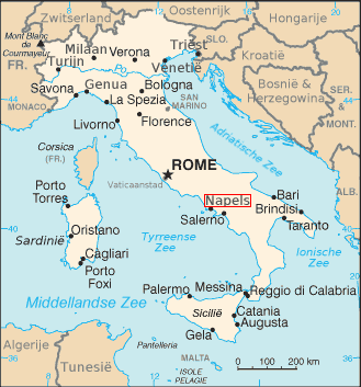 Oorspronkelijk uit CIA Factbook; vertaald in Nederlands door Danielm; omgezet in PNG door BenTels, enkel plaatsnaam met rood gemarkeerd door mij